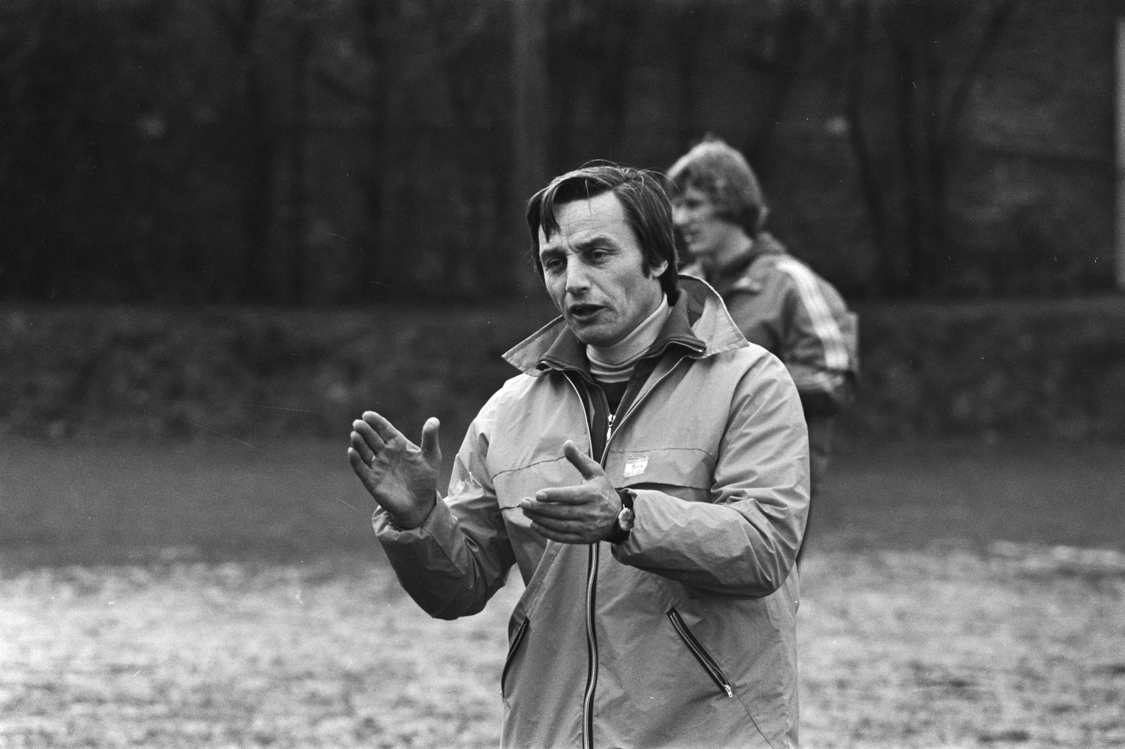 Collectie / Archief : Fotocollectie Anefo Reportage / Serie : [ onbekend ] Beschrijving : Training RWD Molenbeek , Brussel; i.v.m. wedstrijd tegen Feijenoord op 2/3 a.s. Trainer Piet de Visser in aktie Datum : 23 februari 1977 Locatie : Brussel Trefwoorden : sport, voetbal Persoonsnaam : Visser, Piet de Instellingsnaam : Feyenoord Fotograaf : Verhoeff, Bert / Anefo Auteursrechthebbende : Nationaal Archief Materiaalsoort : Negatief (zwart/wit) Nummer archiefinventaris : bekijk toegang 2.24.01.05 Bestanddeelnummer : 929-0433